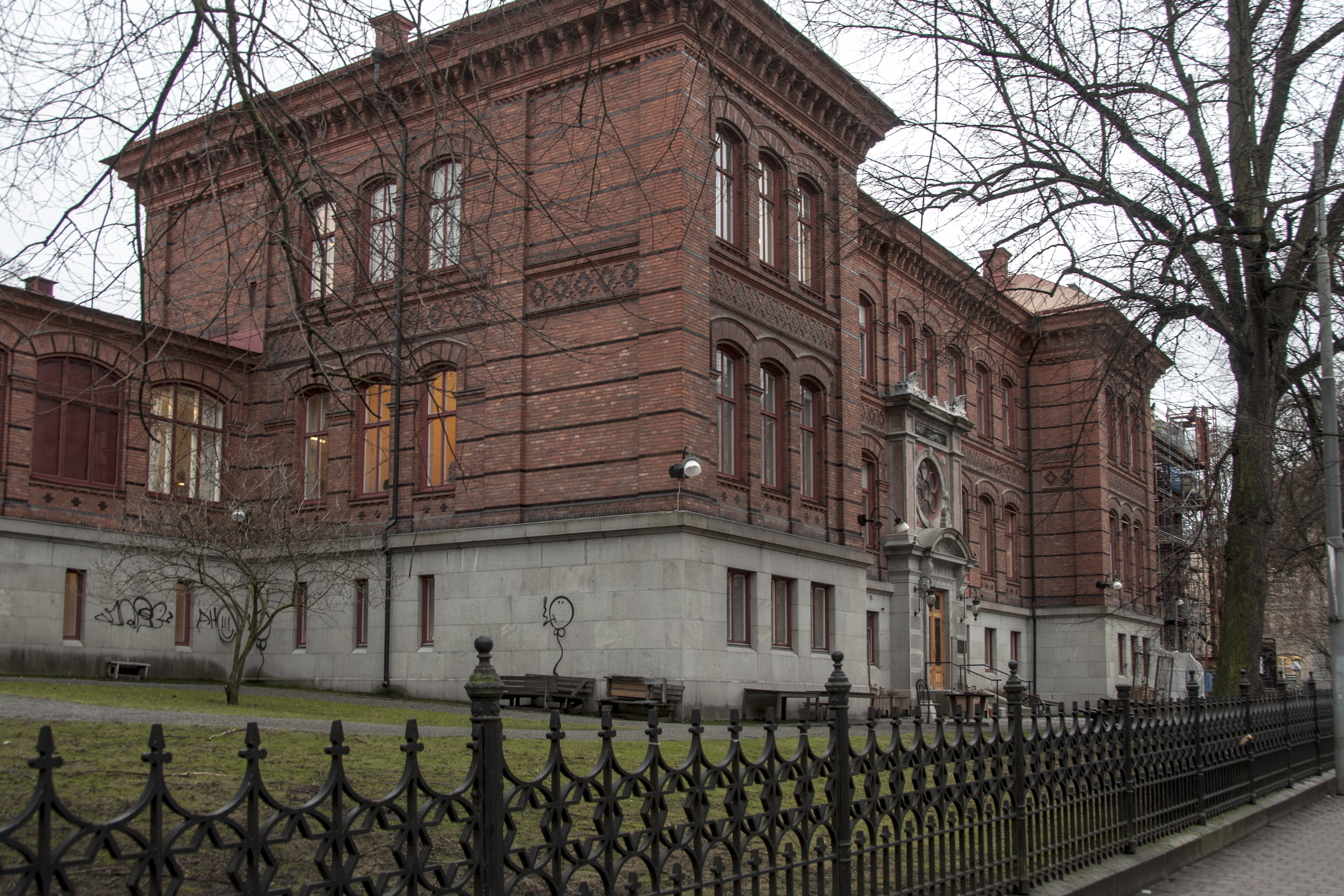 Norrtulls sjukhus, Nybyggnadsår 1880 - 1885 som Allmänna Barnhuset.Arktitekt: Frans Gustaf Abraham Dahl. Byggmästare:Andreas Gustaf Sällström